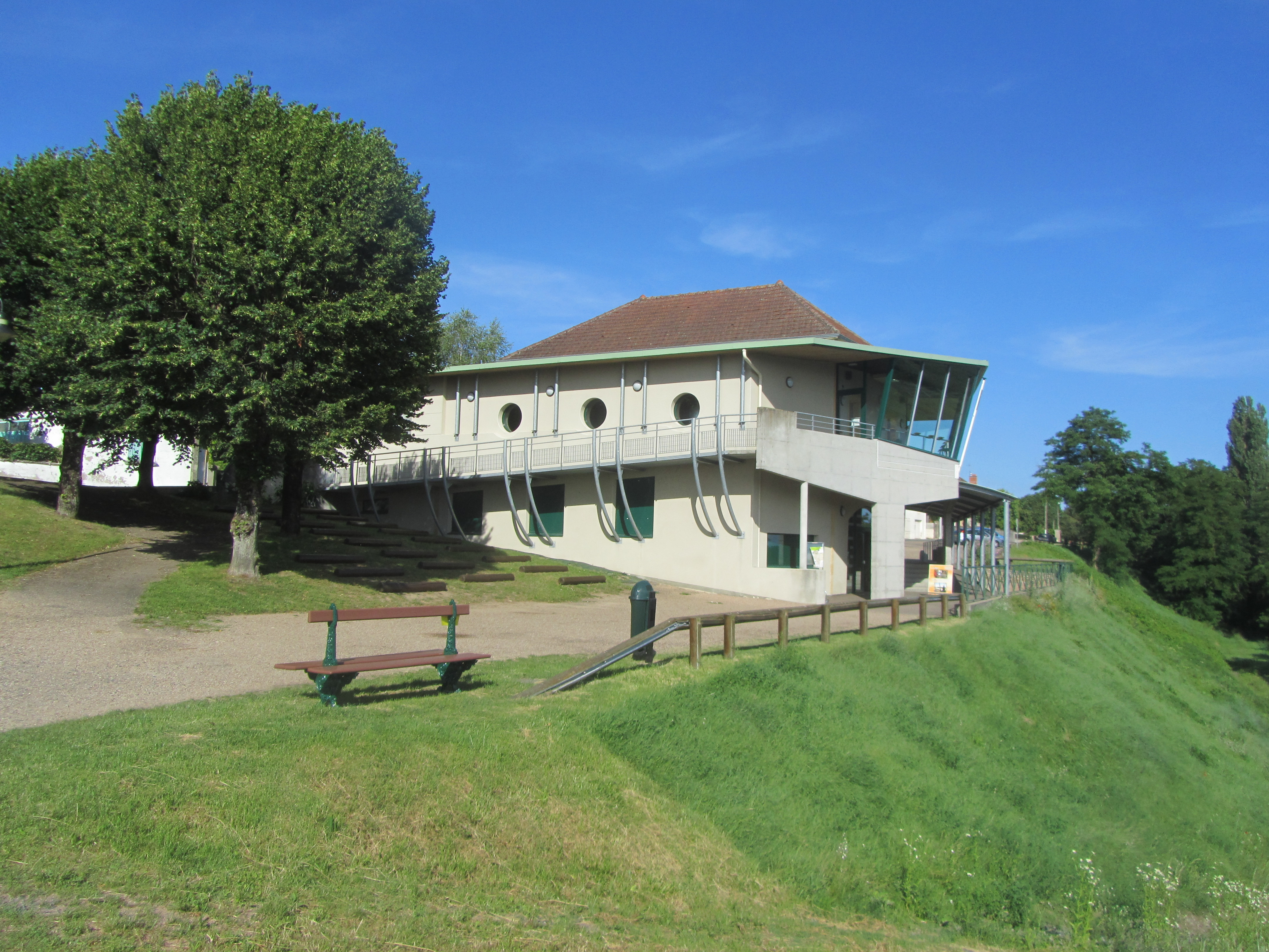 la maison du canal à Digoin